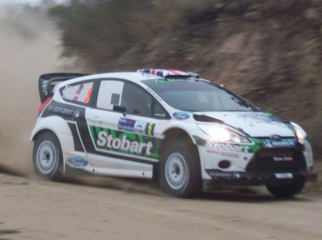 Ford Fiesta WRC Argentina 2011-Wilson Stobart